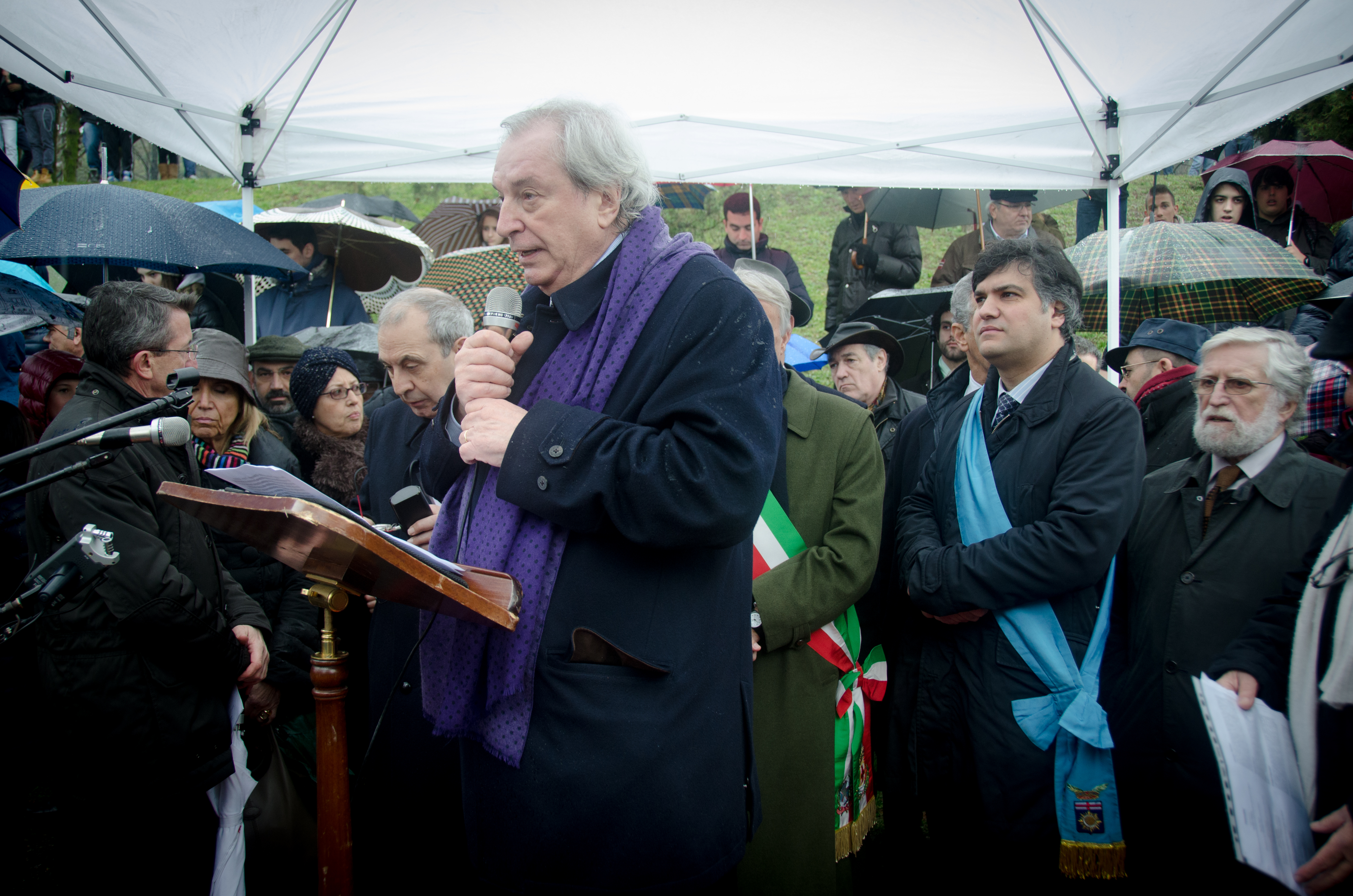 Antonio Ferrari al Giardino dei Giusti di tutto il mondo durante la prima Giornata europea dei Giusti